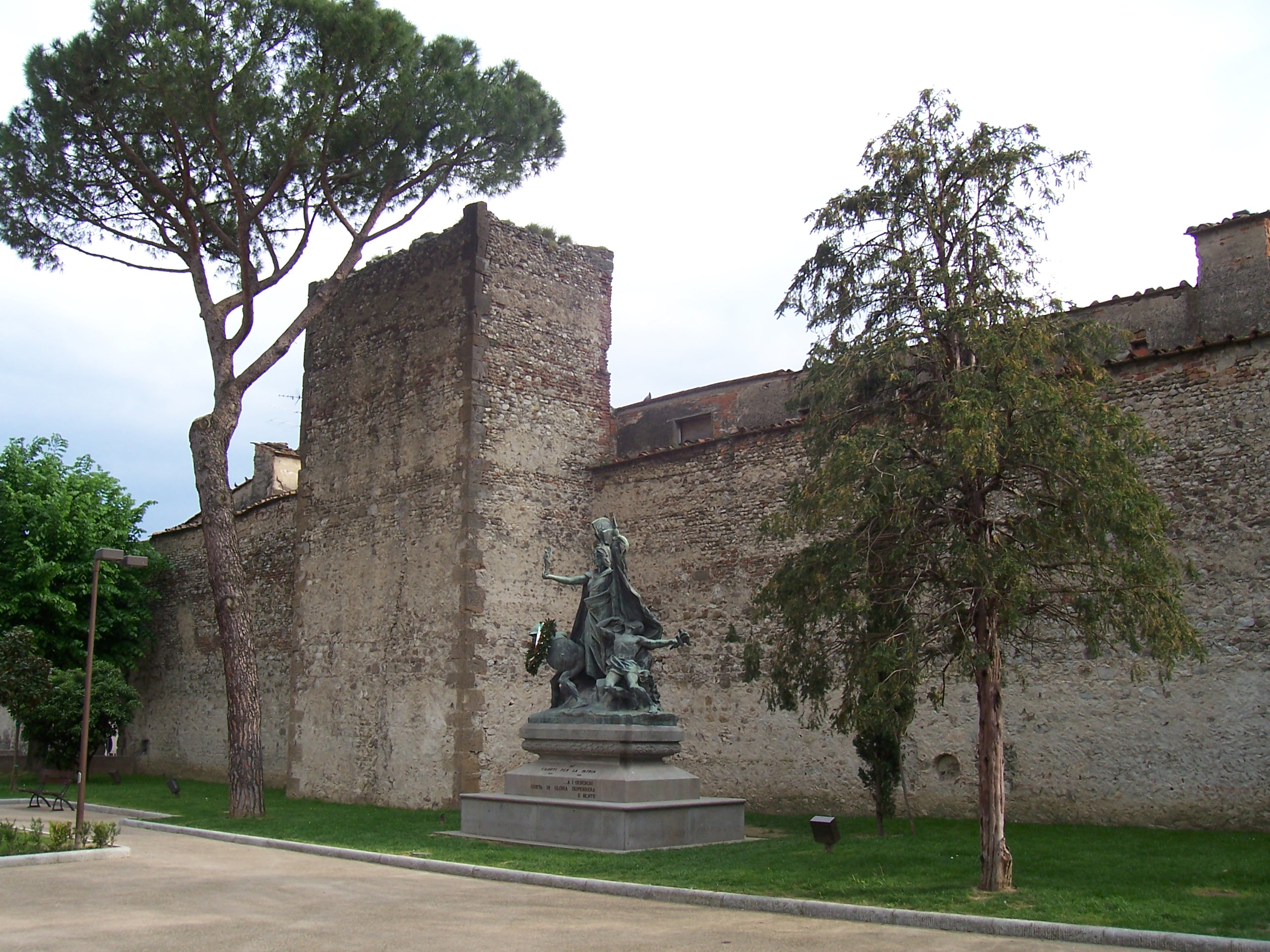 Mura di Campi Bisenzio, part nord